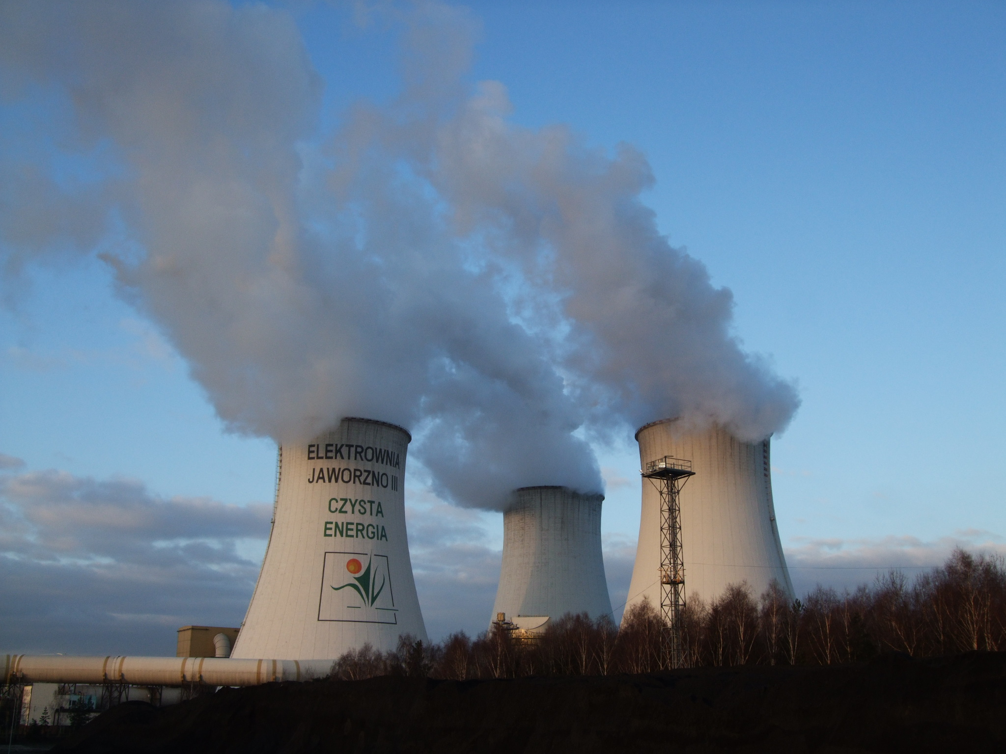 Elektrownia Jaworzno III, chłodnie kominowe.